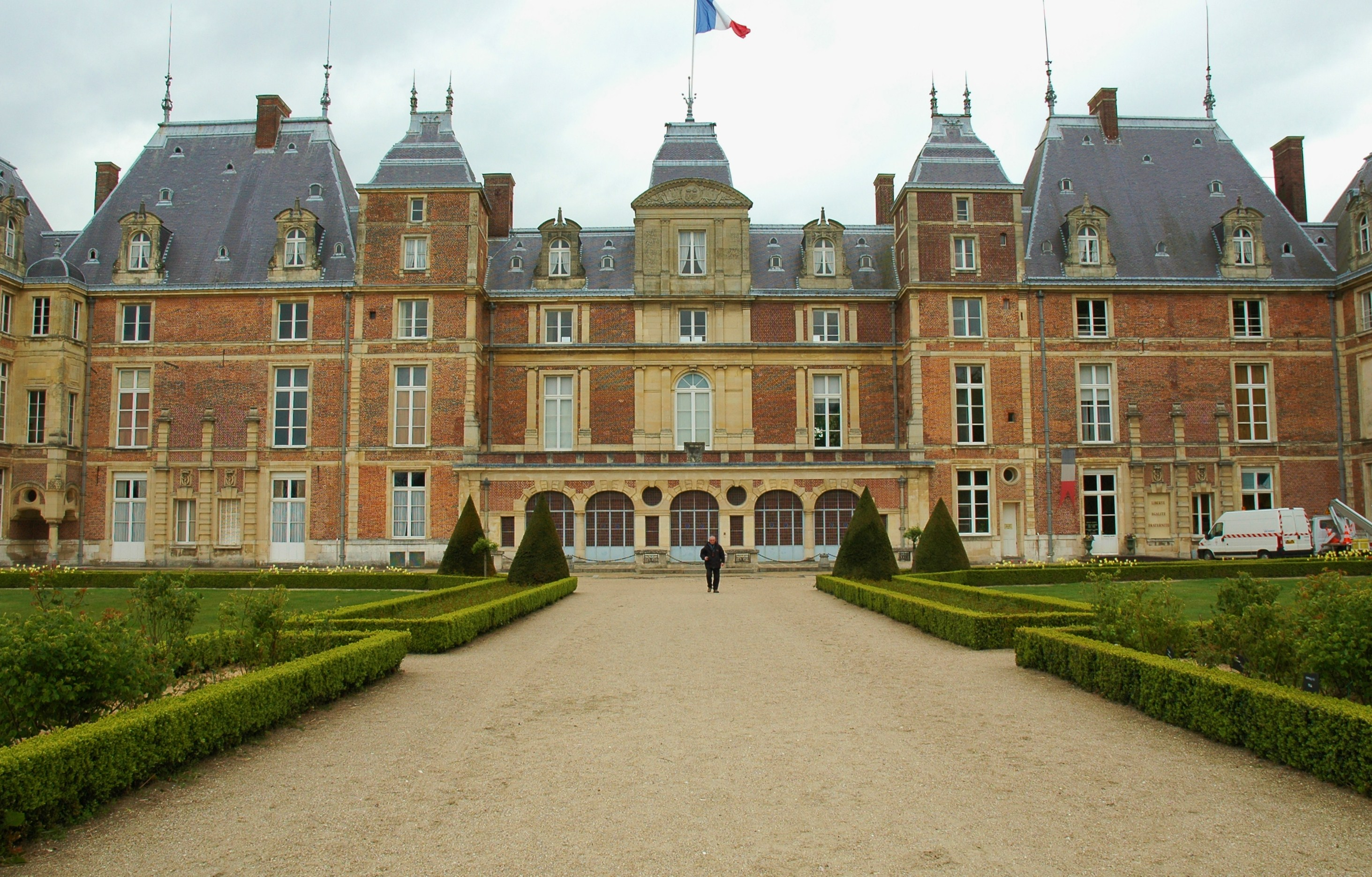 Le château d'Eu, Seine-Maritime, France